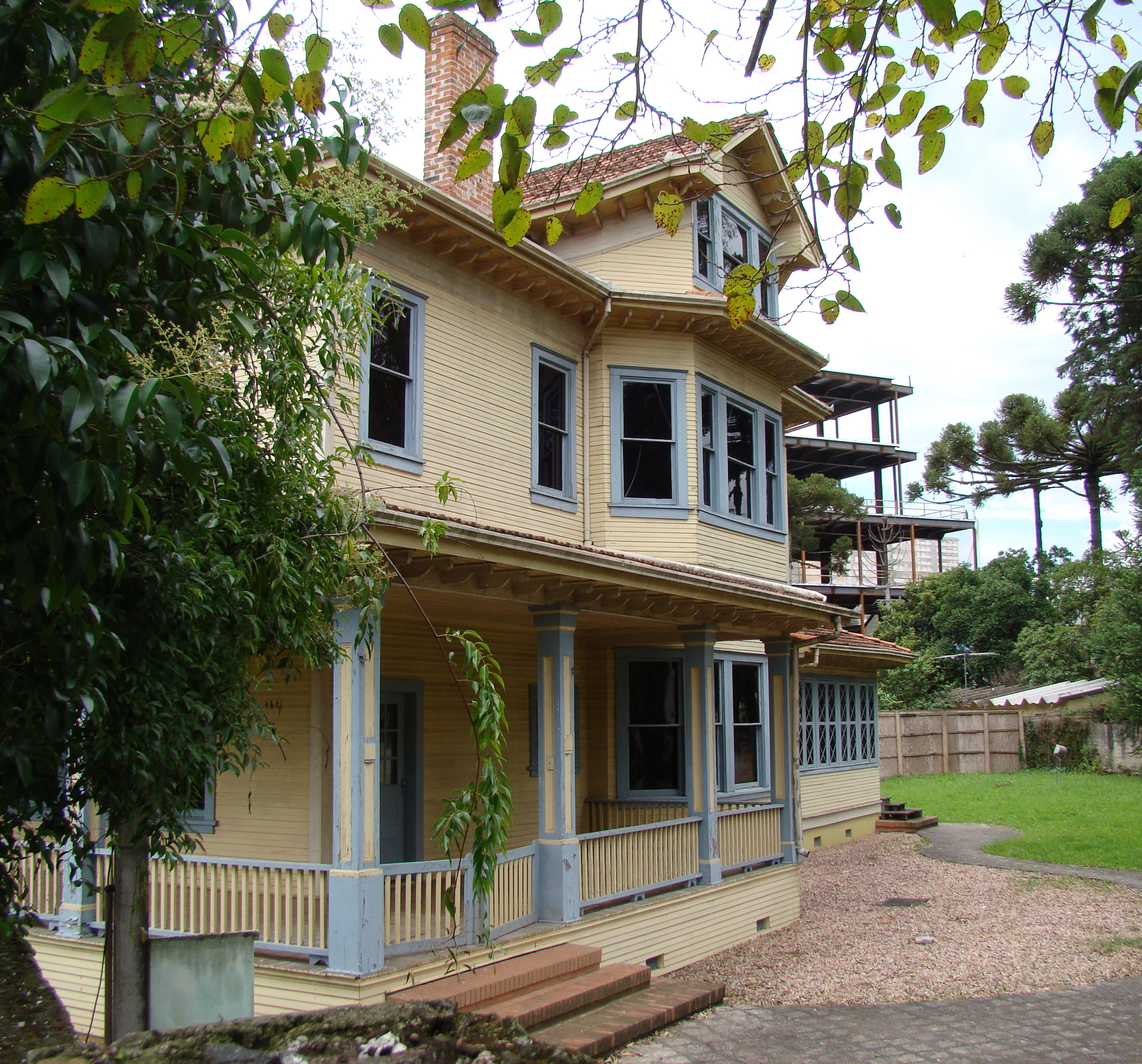 Casa Gomm localizada no bairro do Batel em Curitiba (Paraná, Sul do Brasil). Construída com madeira de pinho de araucária em 1906, em estilo arquitetônico da Nova Inglaterra (EUA), com paredes duplas, sendo a maior casa de madeira de que se tem conhecimento na capital paranaense, é tombada pela Coordenadoria do Patrimonio Cultural e propriedade do Governo do Estado.